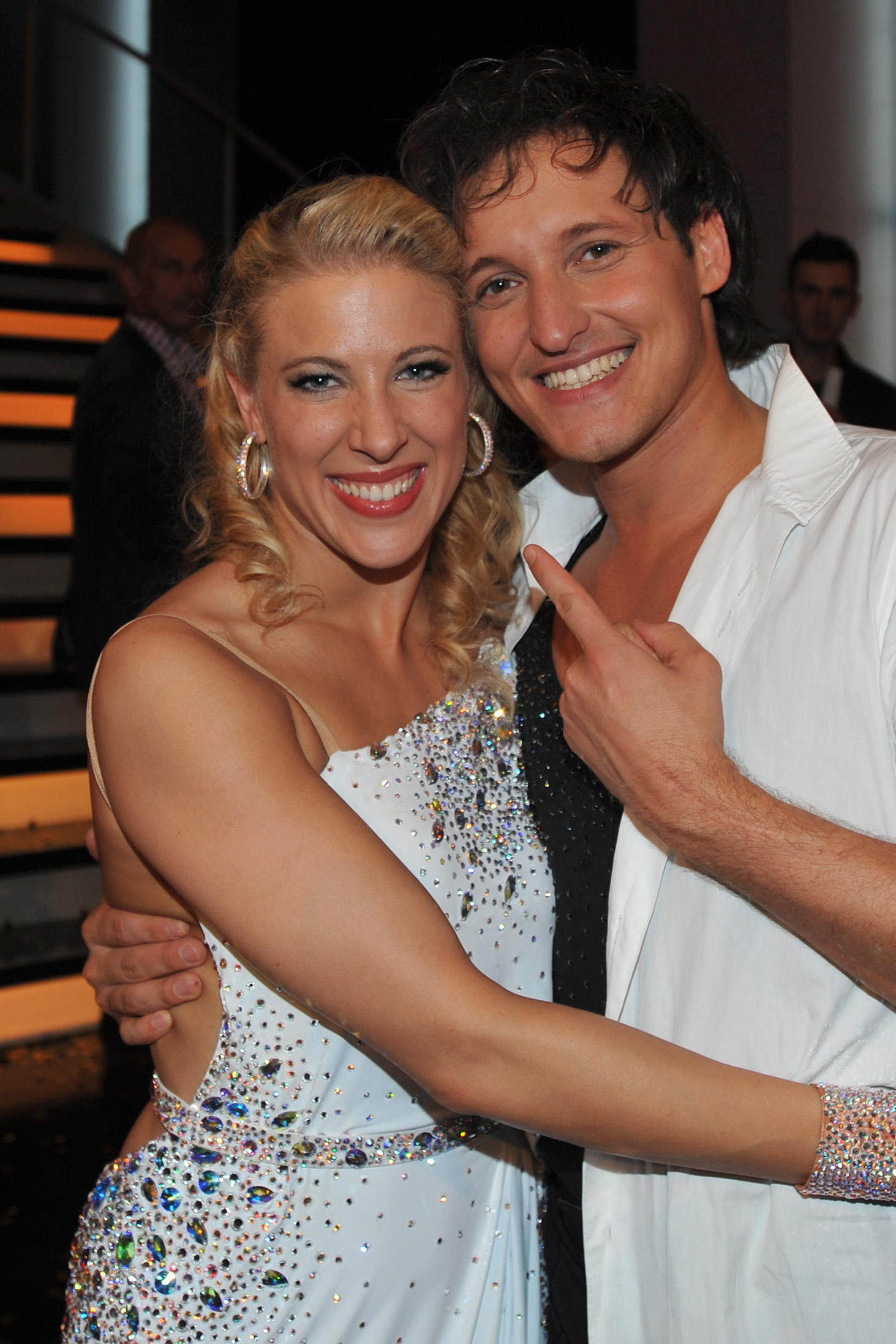 "Dancing Stars" am 16. Mai 2014: Marco Angelini, Maria Santner